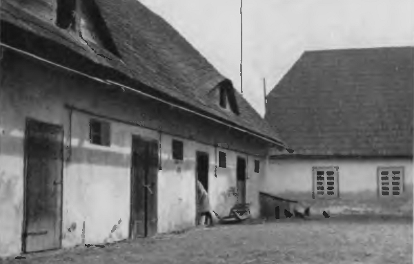 Försterei in Chronstau in Oberschlesien um 1930